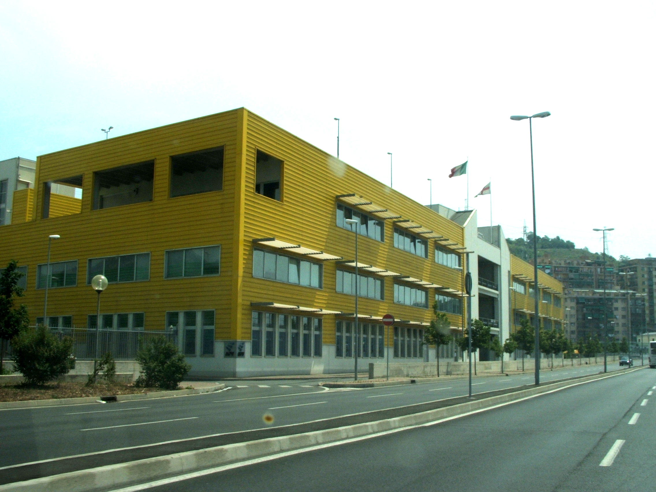 Genova Capannone industriale fra Sestri Ponente e Cornigliano